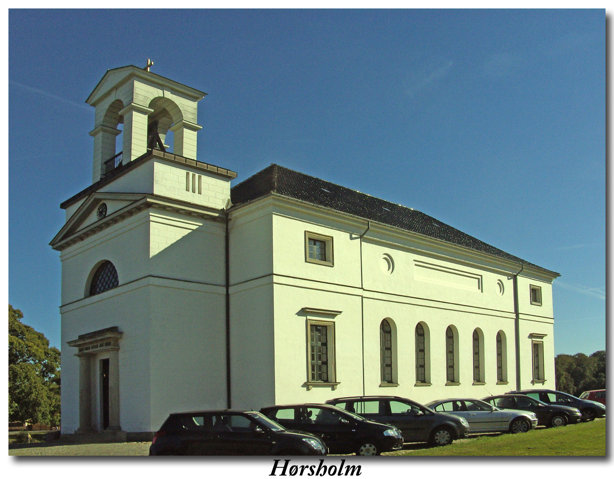 fra sydvest